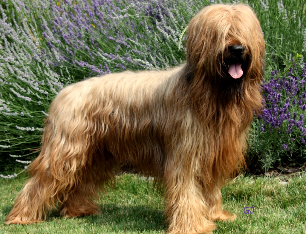 Aramis les Beaux Travailleurs